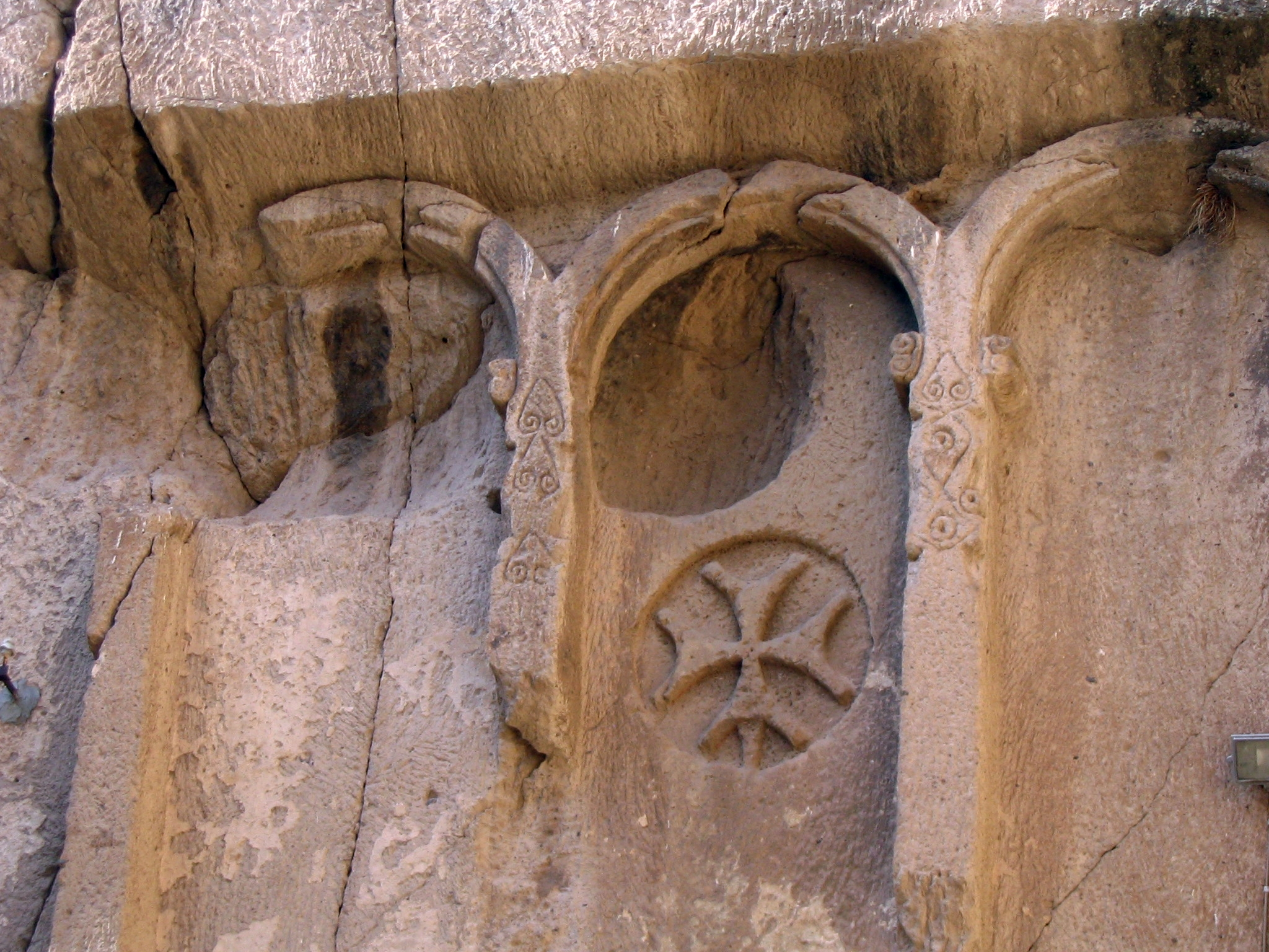 Fassade im Innenhof der Klosteranlage von Eski Gümüş bei Niğde in Kappadokien, Zentraltürkei